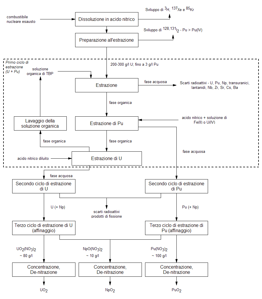 Schema a blocchi del proesso PUREX - traduzione e adattamento dello schema pubblicato su ru.wiki Disegnato da Paginazero